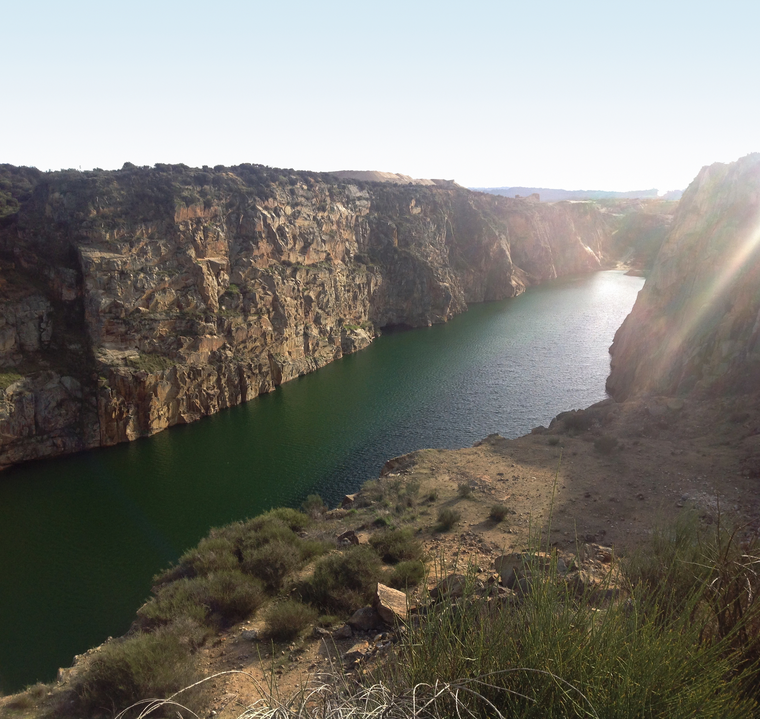 Mina de wolframio de Barruecopardo, La Ramajería, Castilla y León, España.